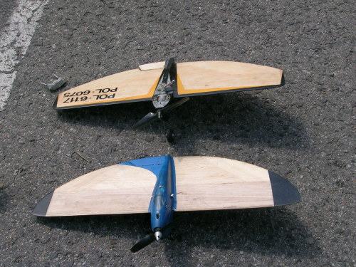 modele F2C przygotowane do wyścigu Pierwszy (niebieski) to Dzikolot na KMD obecnie nie lata (z powodu urwanej dźwigienki lotki.. jak?! ) drugi to Cellarolot Też nie lata ale już nie z powodu technicznego tylko z personalnego (model autora textu..) BiSteam